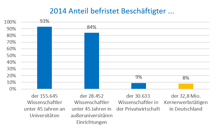 2014 in Deutschland befristet beschäftigte Wissenschaftler an Universitäten, außeruniversitären Forschungseinrichtungen und in der Privatwirtschaft.[1]